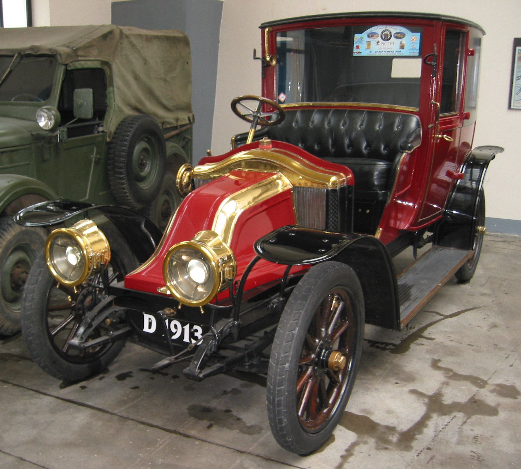 Renault Type DM Coupé-Chauffeur von Labourdette 1913